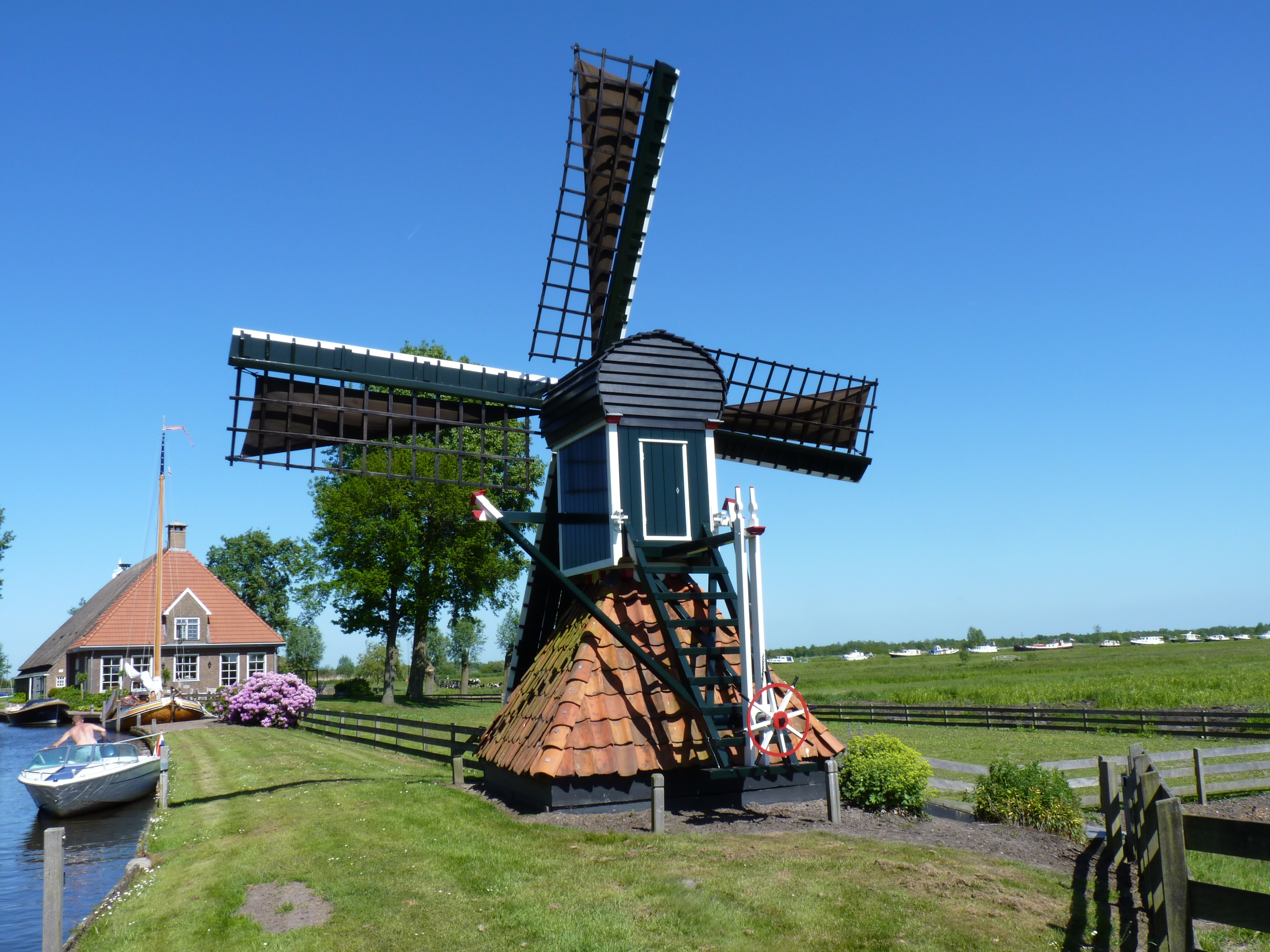 Wartena Spinnekopmolen De Ikkers